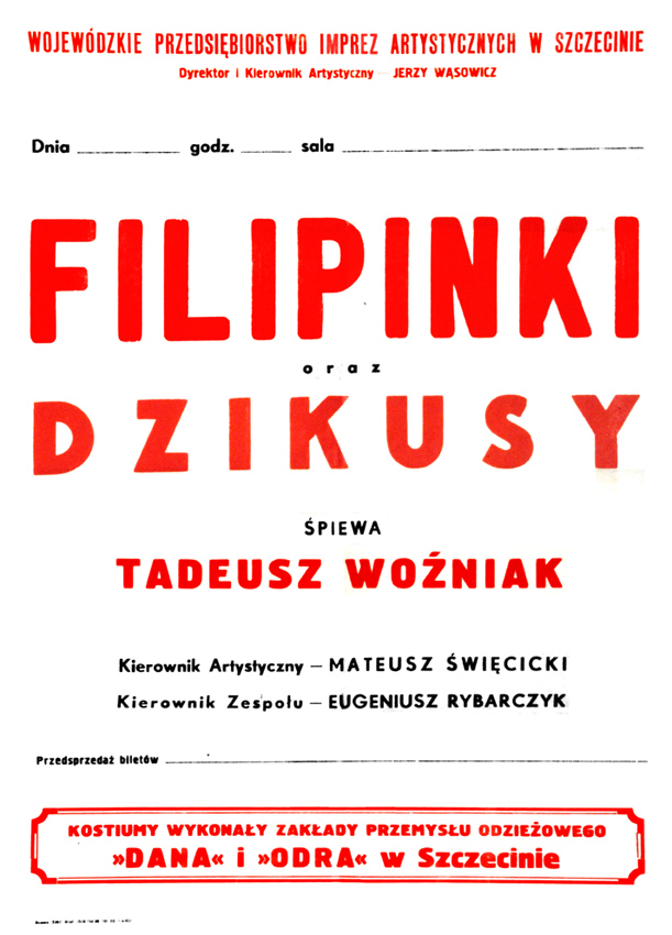 Afisz reklamujący koncerty Filipinek i zespołu Dzikusy w 1968 r.